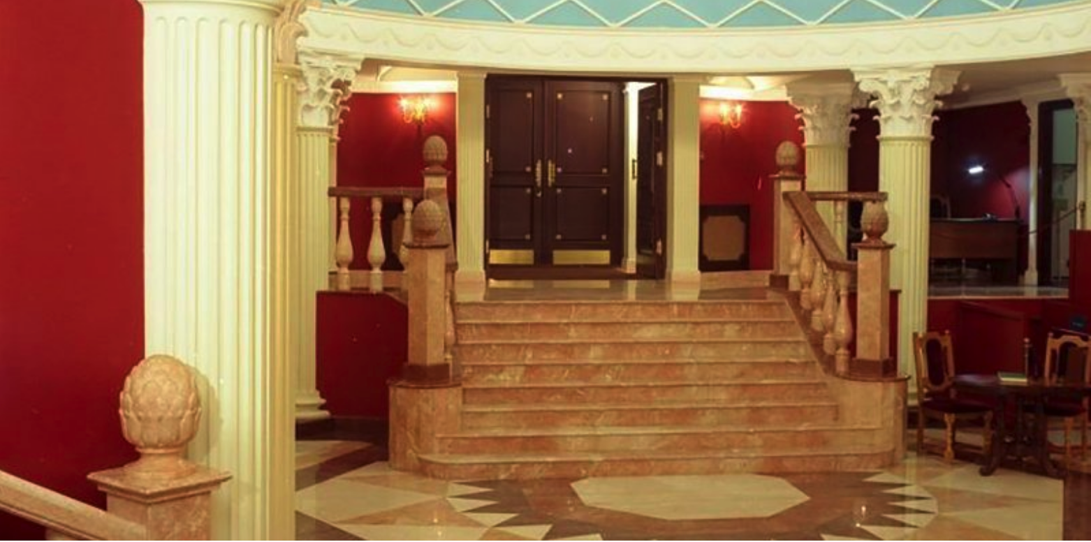 Интерьеры галерея Александра Шилова, 2018 год